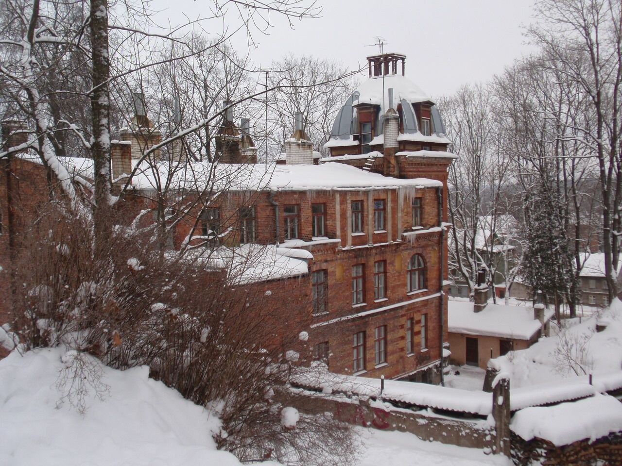 Elamu Tartus Lai tn.1, 1881.a.